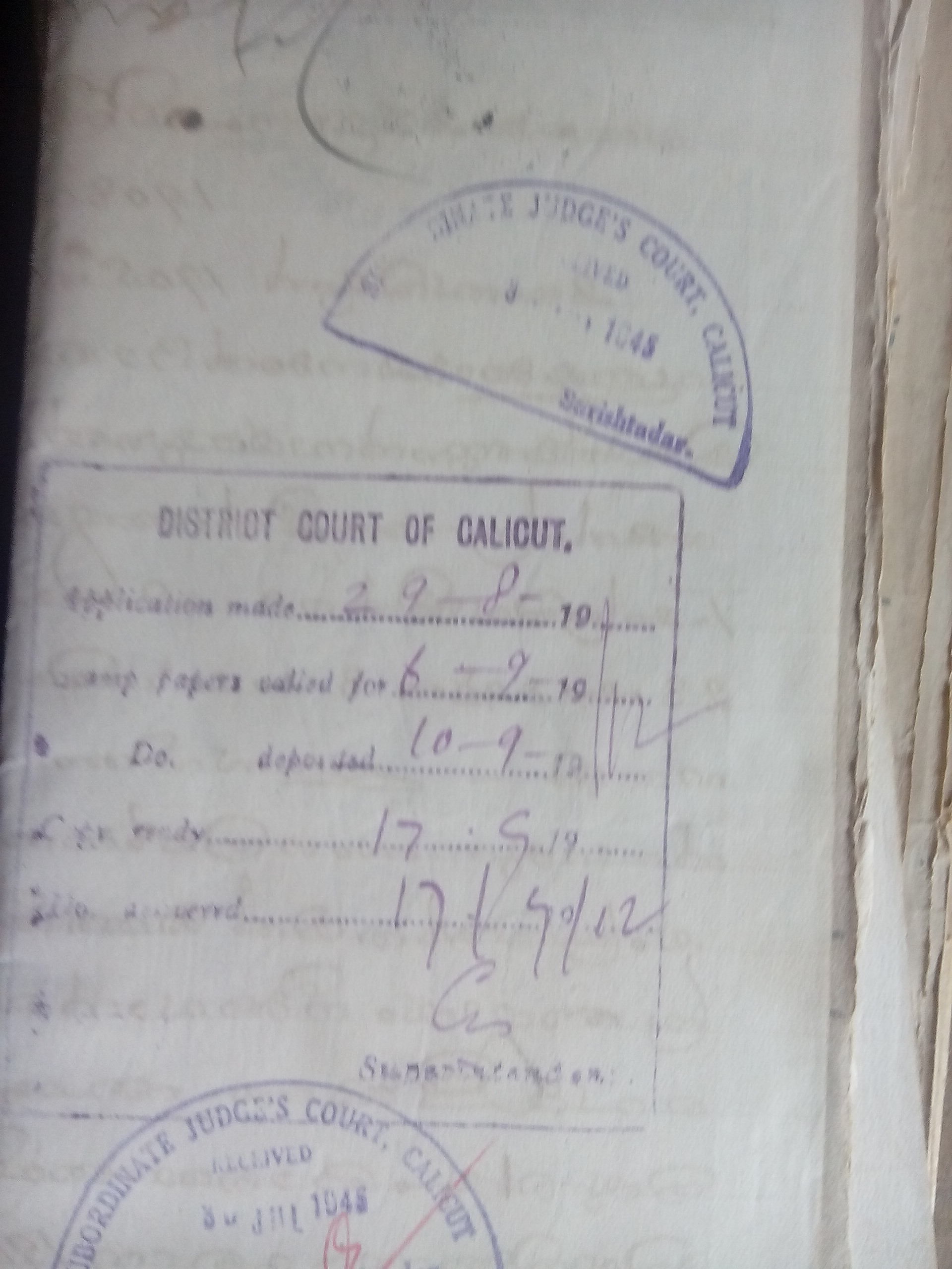 വിവരണങ്ങൾ ചേർക്കാൻ പാകത്തിലുള്ള കോടതി സീൽ. 1890ലെത്.